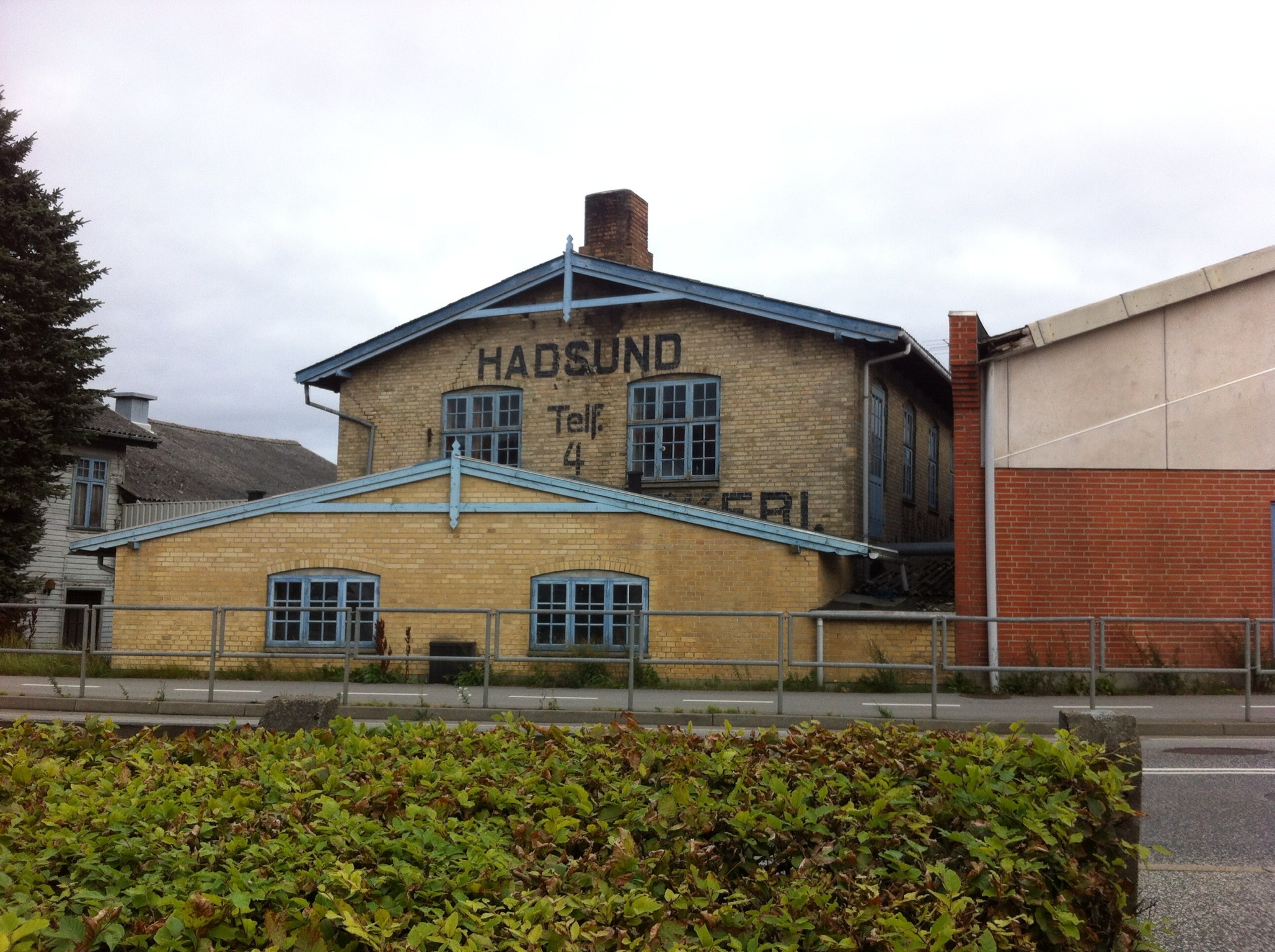 Det gamle Maskinsnedkeri i Hadsund